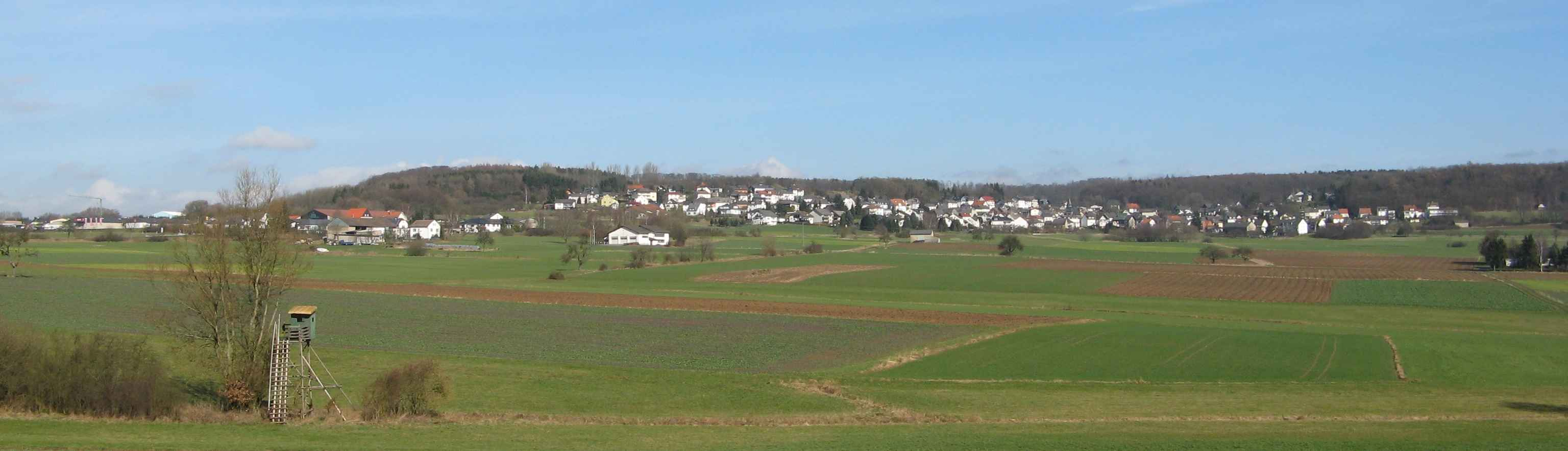 Fussingen Panorama